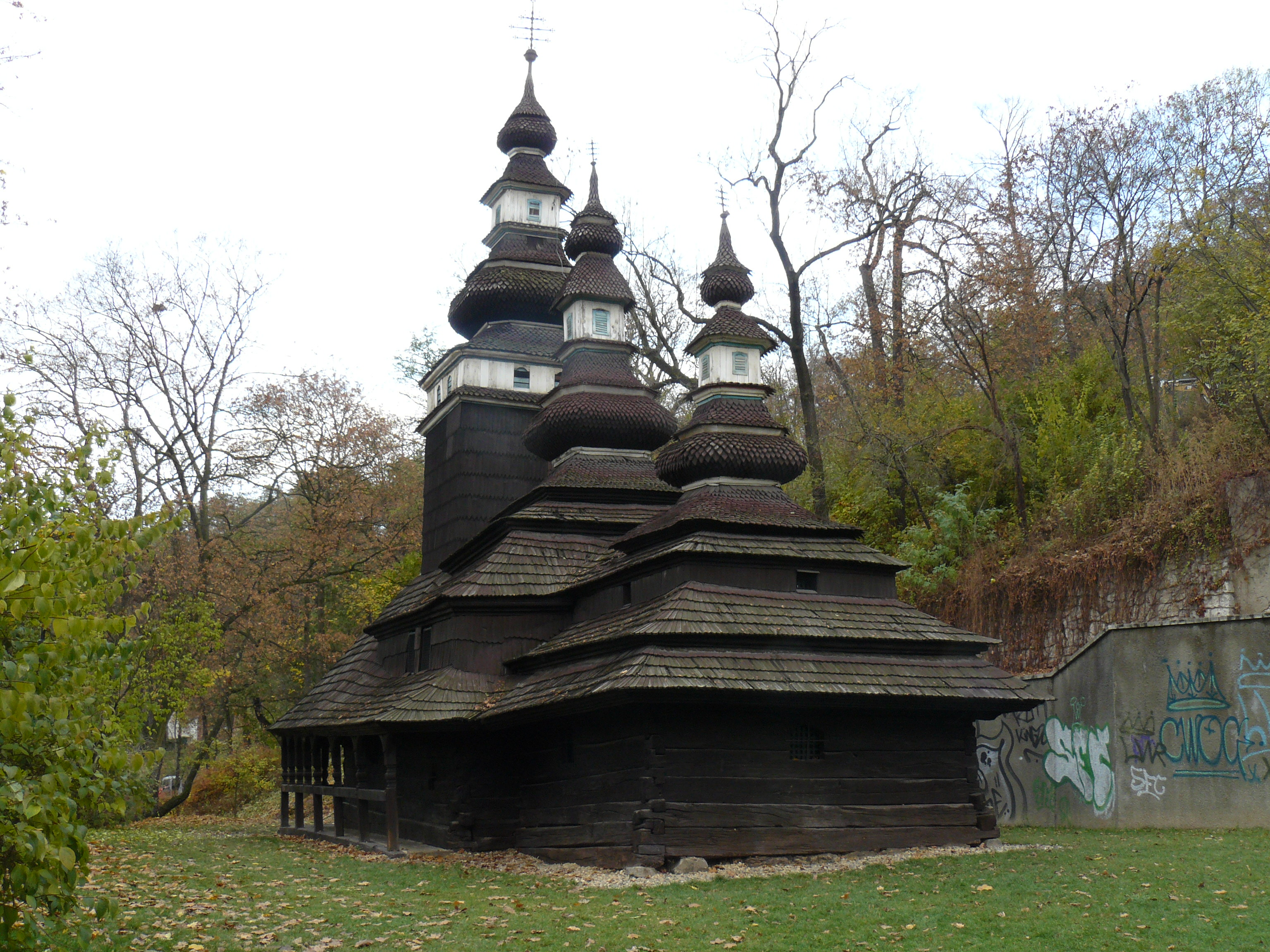 Kostelík sv. Michala v Kinského zahradách na Smíchově